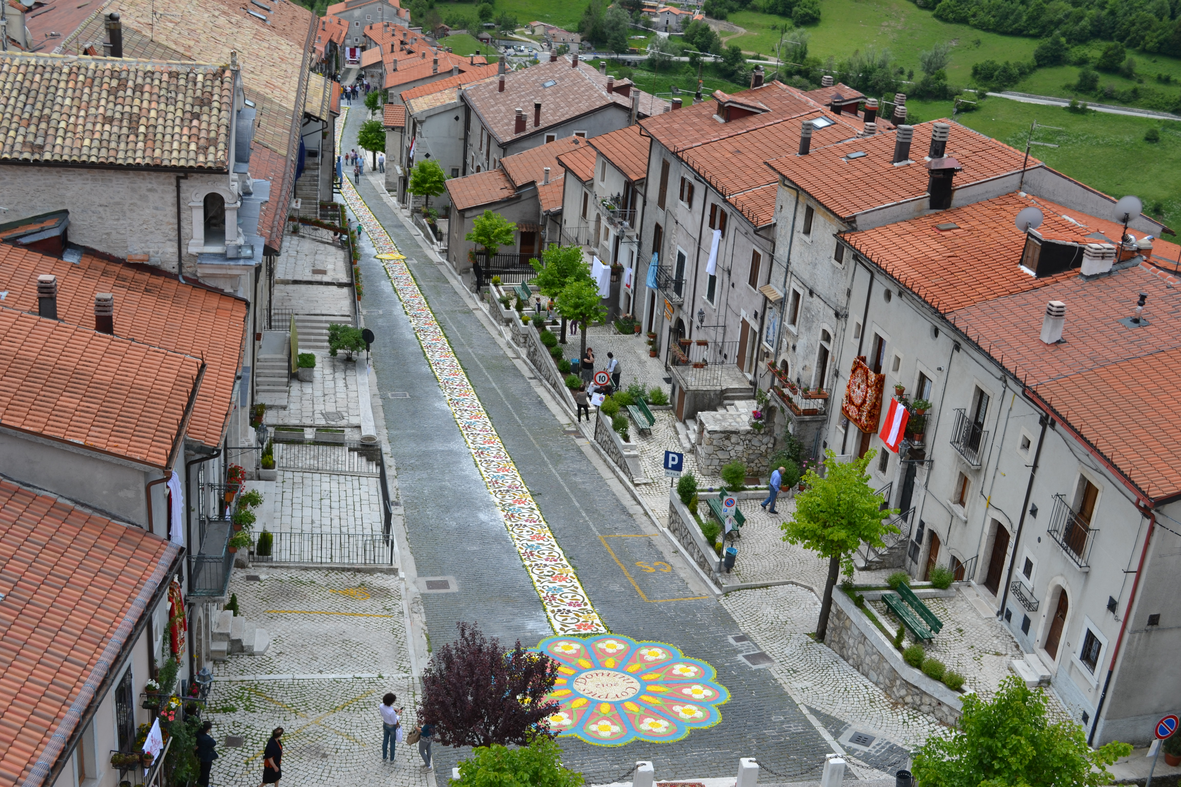 Centro storico di Opi Veduta di Opi Opi paese This is a photo of a monument which is part of cultural heritage of Italy.